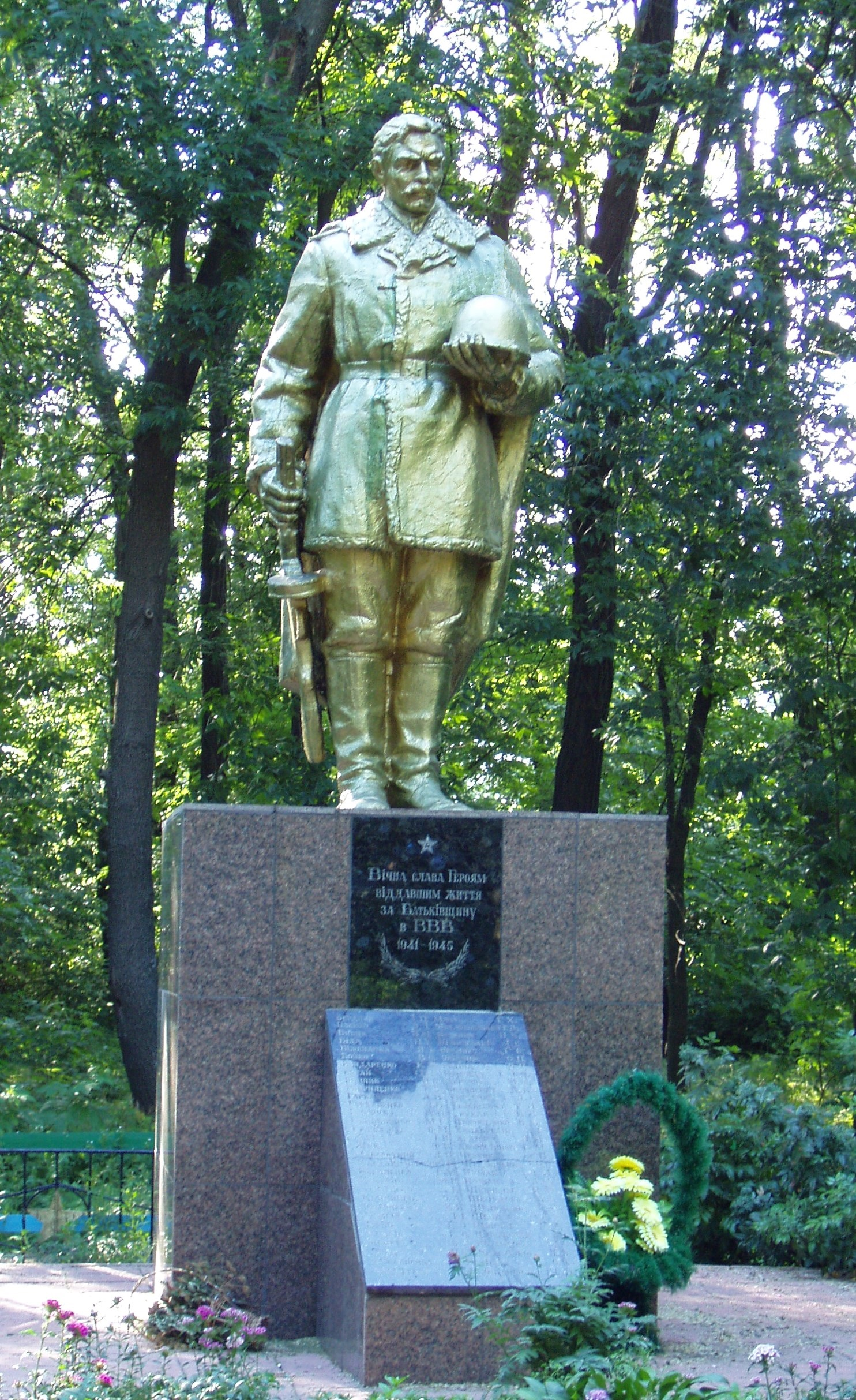 Братська могила воїнів Радянської Армії і пам'ятник воїнам-односельцям, які загинули в роки Великої Вітчизняної війни, село Мирне Бориспільського району (Київська область, Україна), вул. Леніна (біля сільської ради)